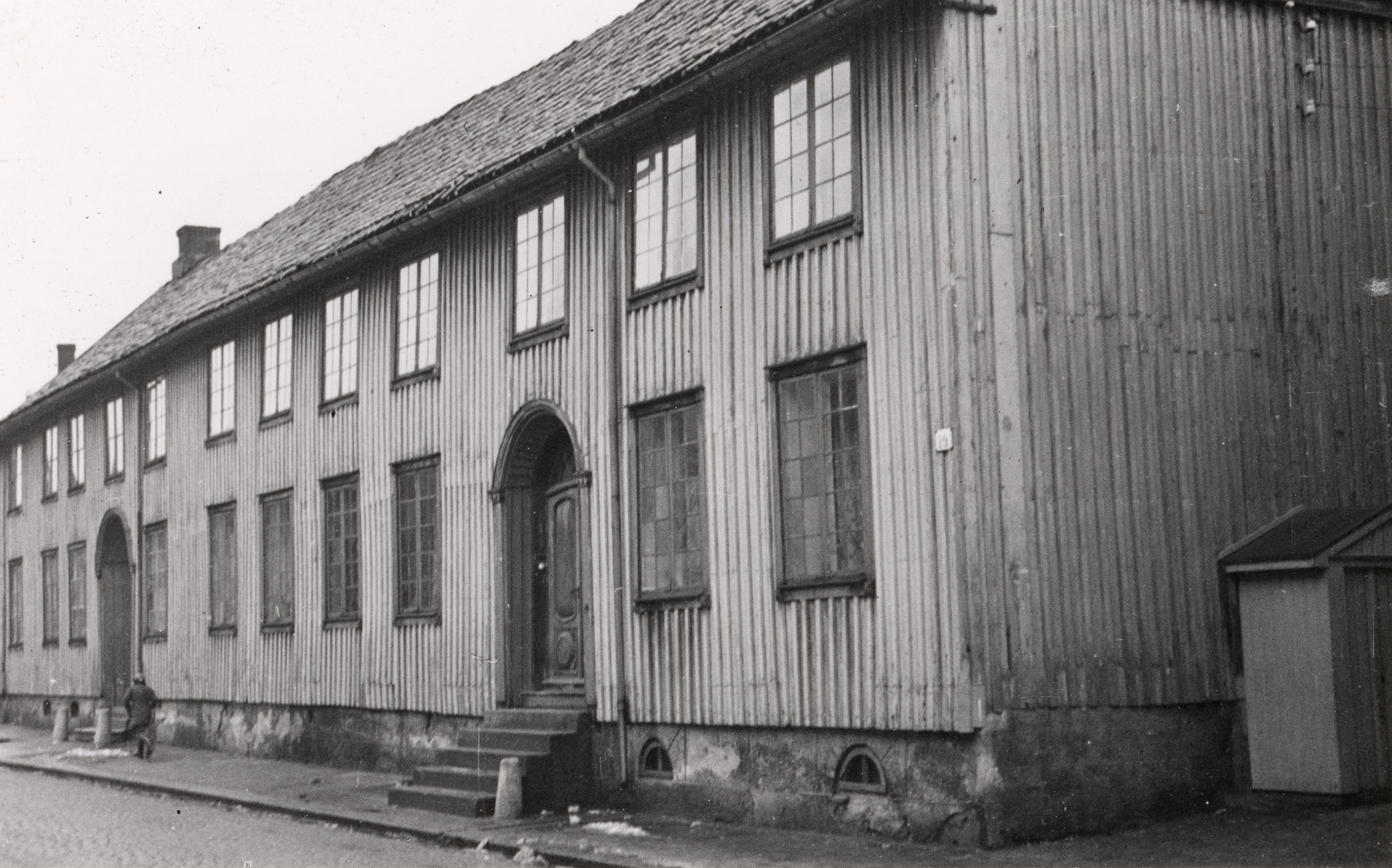 Kochegården i Tønsberg, Vestfold This image on crowdsourcing geotagging platform Fotodugnad